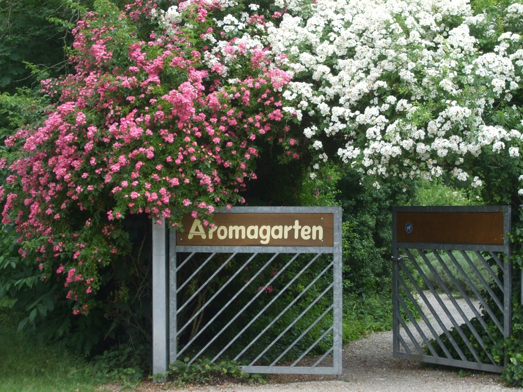 Eingang